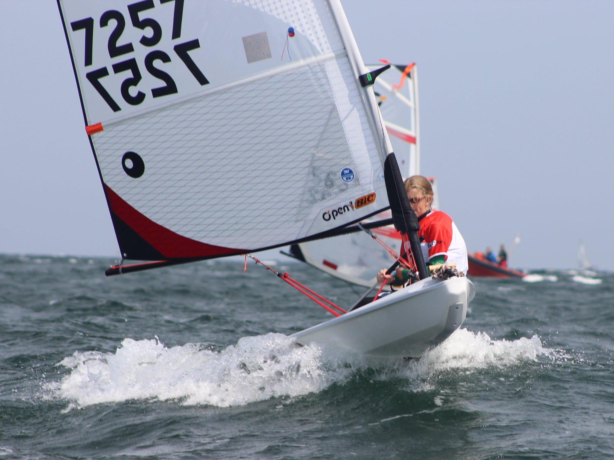 Wellenreiten bei der WM 2015